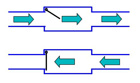 Schaubild für die Funktion eines Rückschlagventils